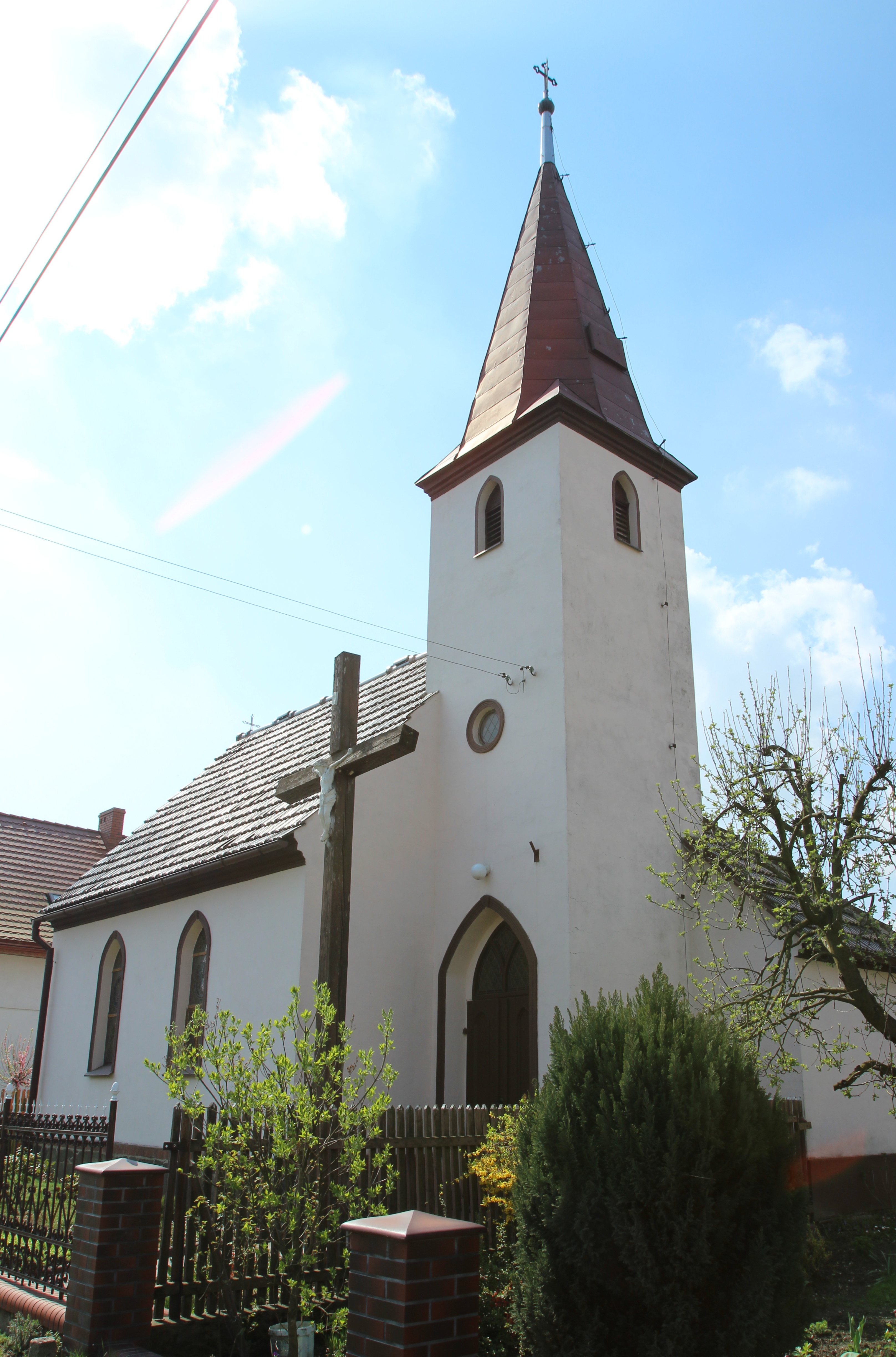 Myszowice – rzymskokatolicki koścół filialny pw. MB Dobrej Rady.